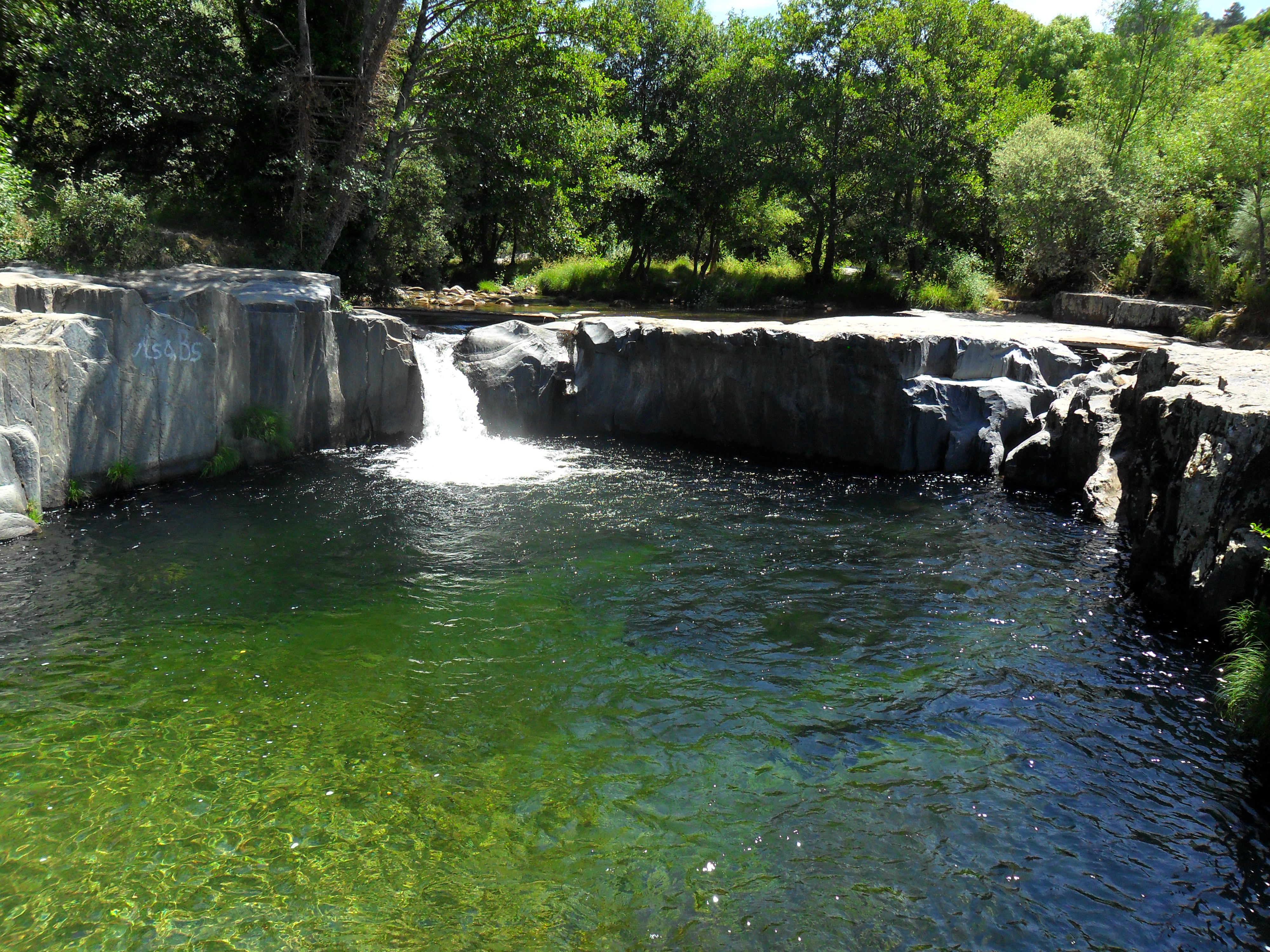 Também conhecido como "Poço do Zé Azinho". Zona balnear da ribeira do Paul (Vila do Paul - Covilhã) This is a photography of a Site of Community Importance in Portugal with the ID: PTCON0014. Natura2000 entry, EEA entry